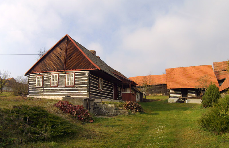 Roubenka v čp. E73 v Lhotě u Chříče, kulturní památka. Datum: 30. listopadu 2005